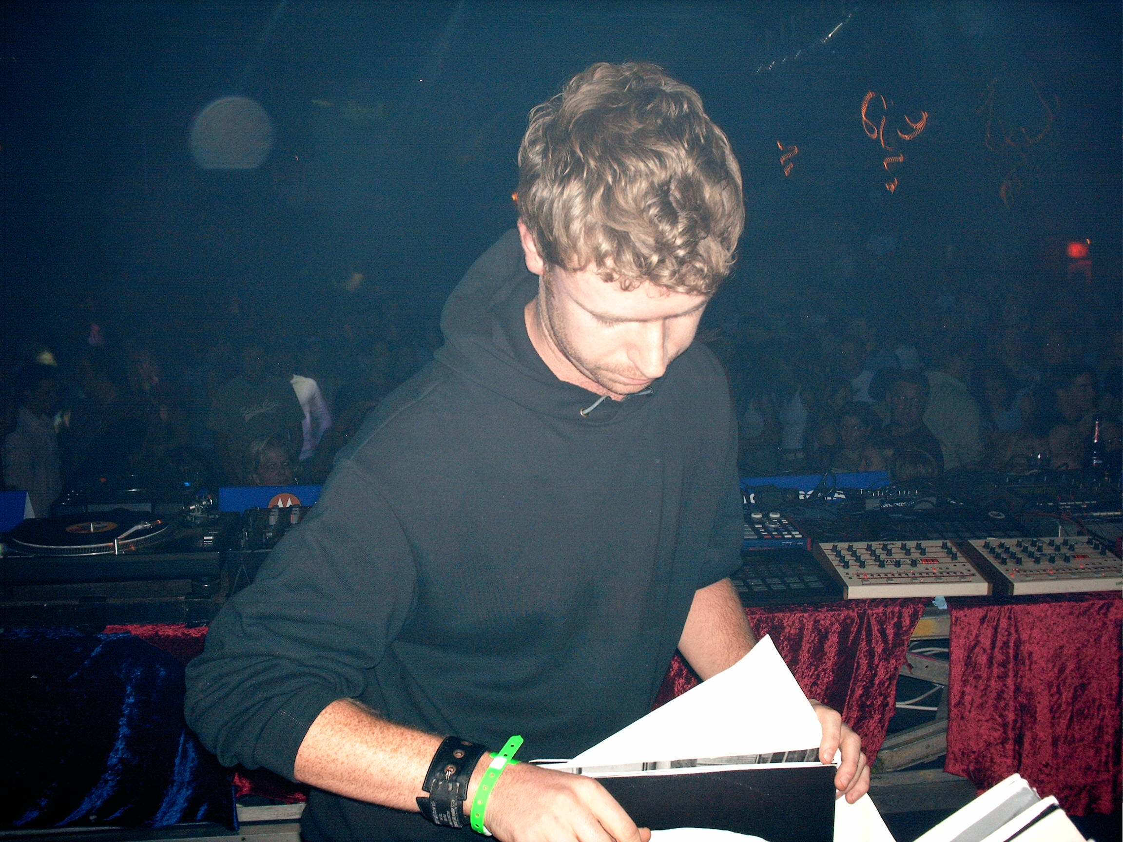 Dieses Foto habe ich selbst in der KuFA Saarbrücken im Rahmen der Electric Kingdom-Tour am 1.10.2004 geschossen.